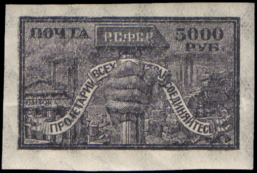 Почтовыя марка СССР. Стандартный выпуск РСФСР. Второй стандартный выпуск РСФСР